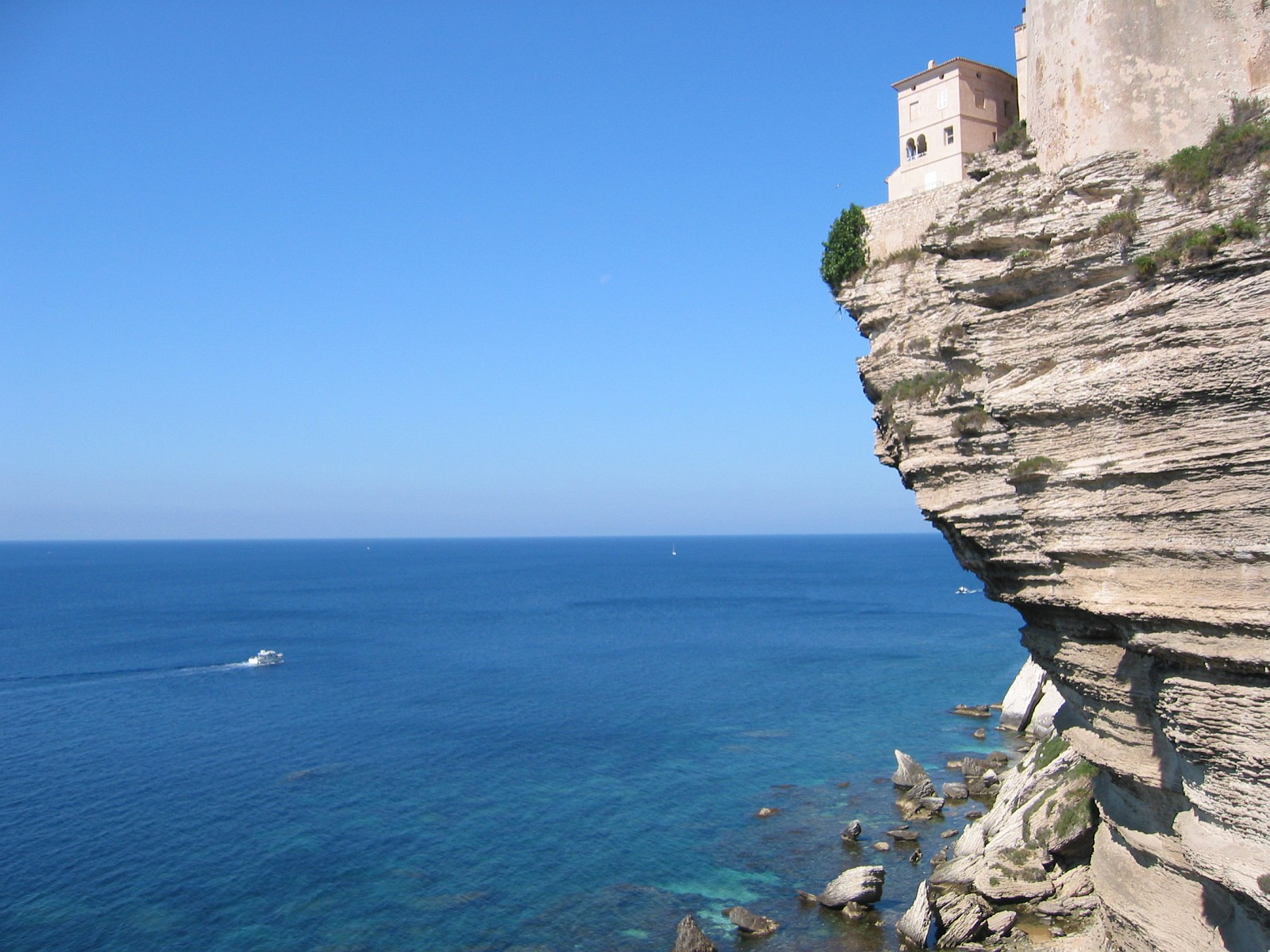 Bonifacio (Corse-du-Sud, France)